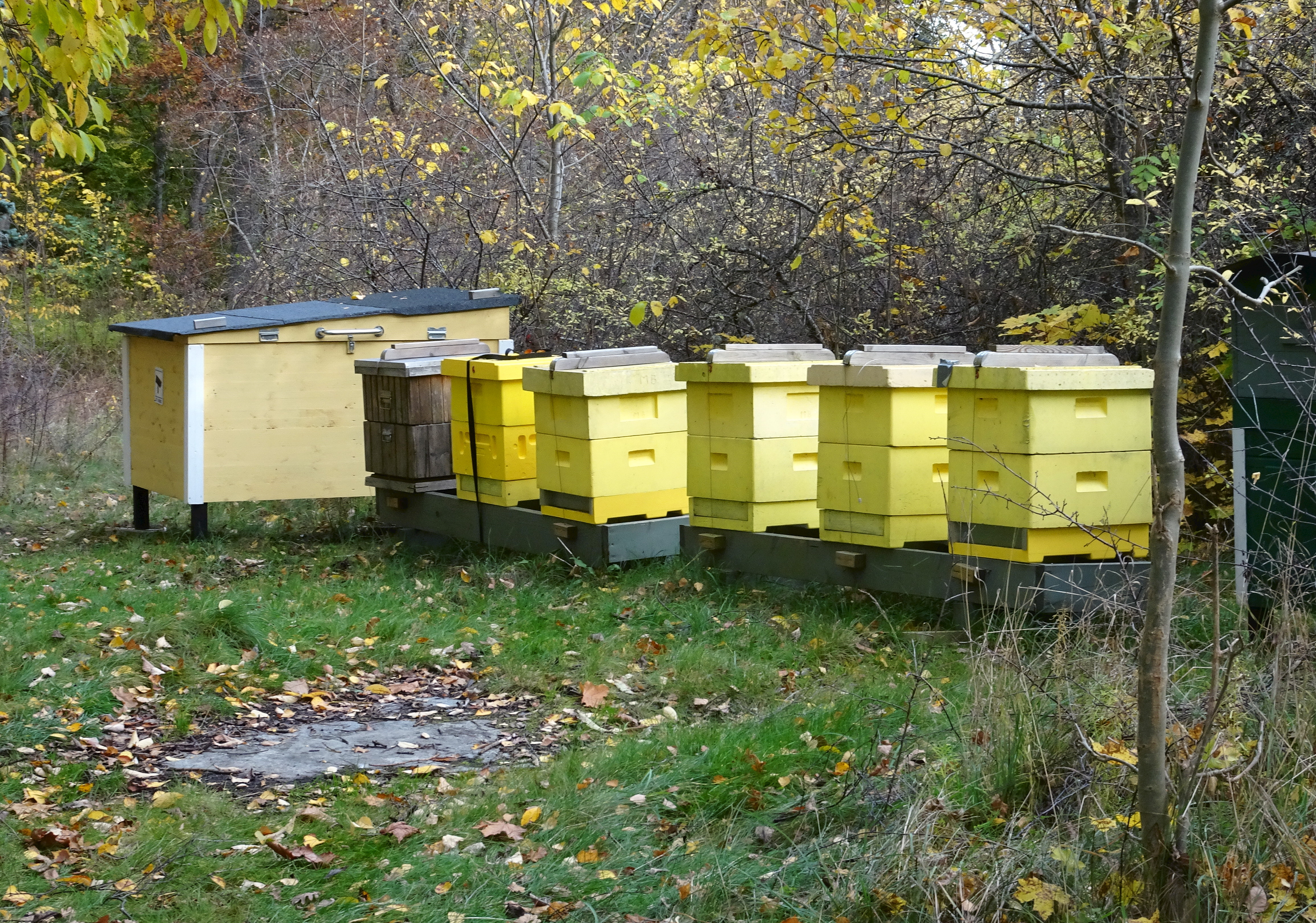 Ekebyhovs Äppelgenbank, Biodlarföreningen på Mälaröarnas föreningsbigård